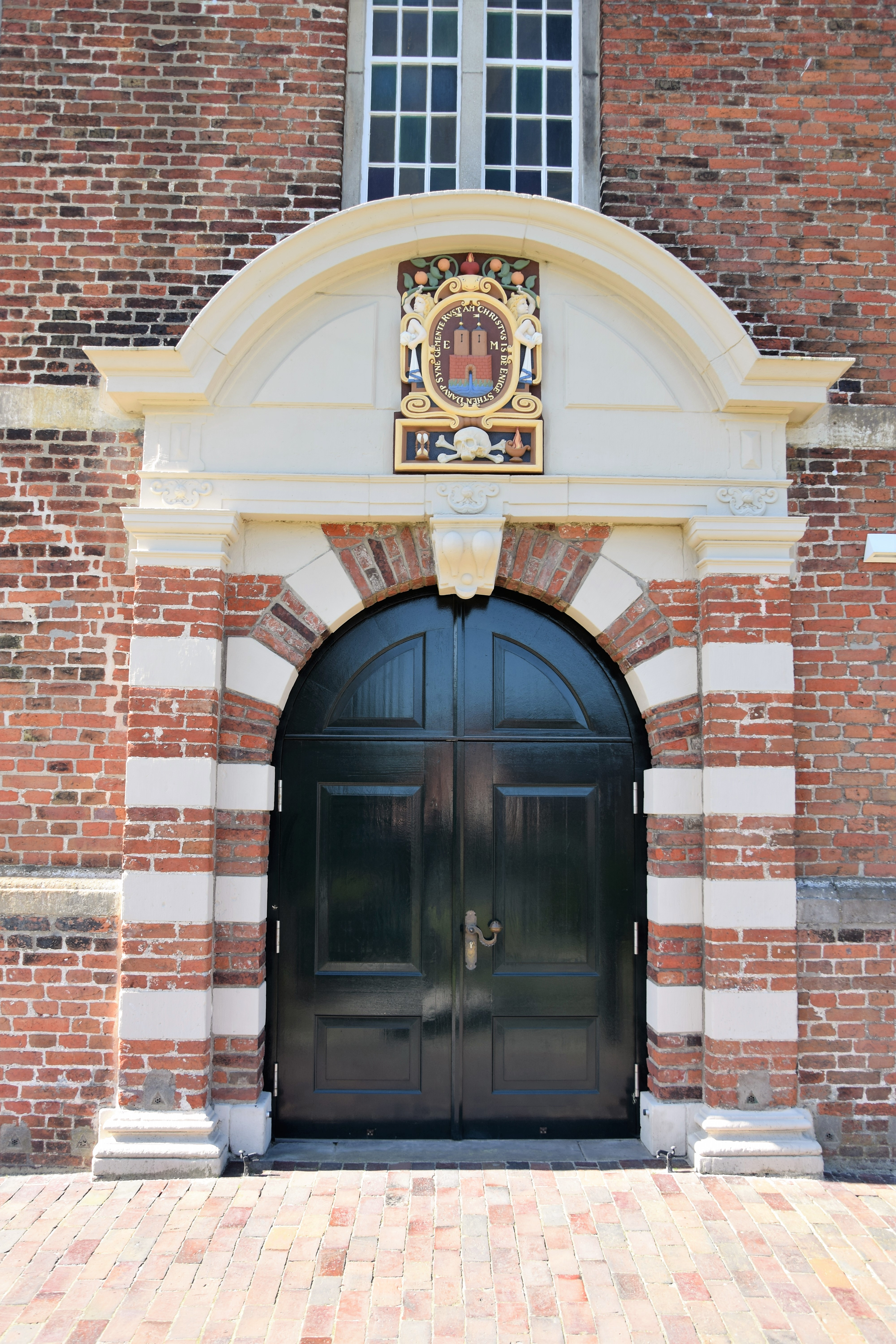 Neue Kirche Emden, Ostfriesland, Deutschland